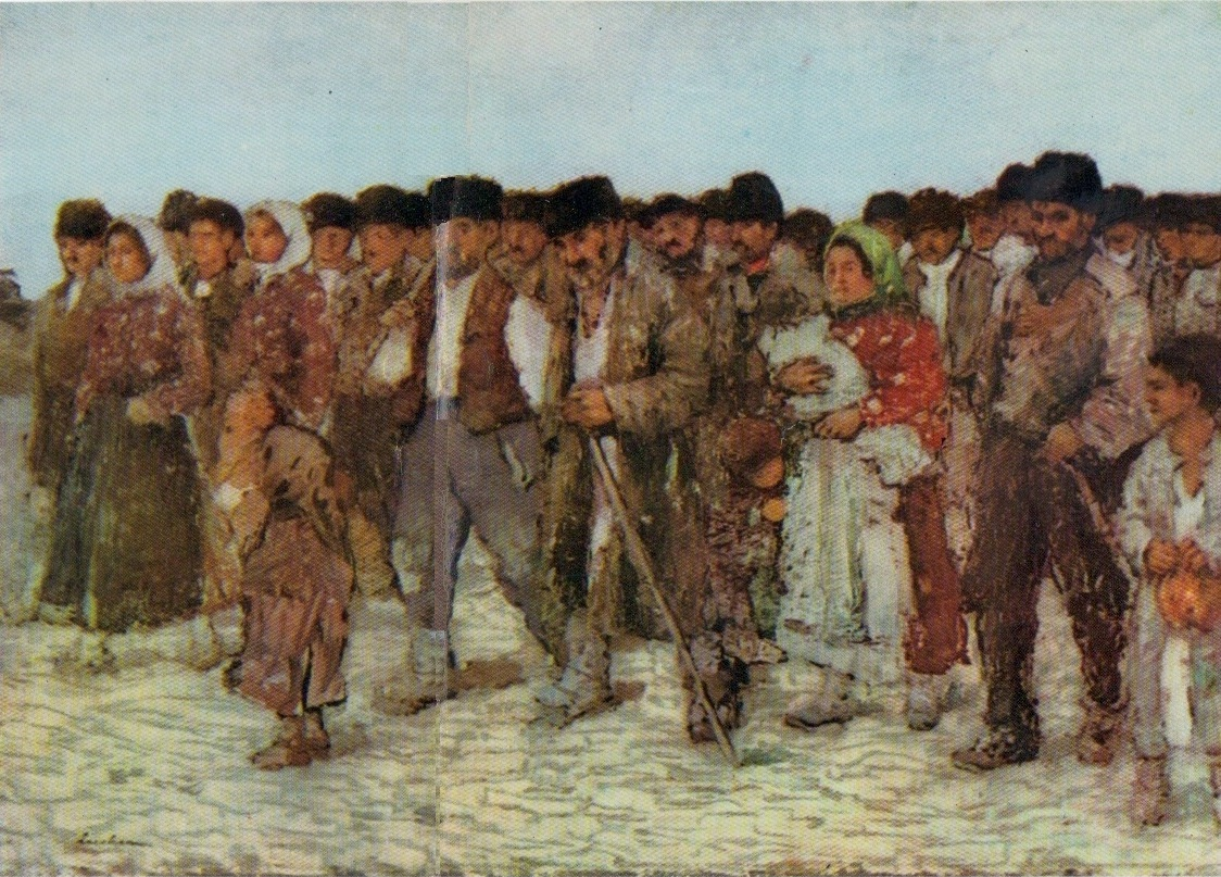 Ştefan Luchian - La împărţitul porumbului, ulei pe pânză, Myzeul Naţional de Artă al României din Bucureşti